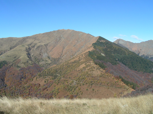 Monte Gradiccioli 1936 m-L.m. Canton Ticino